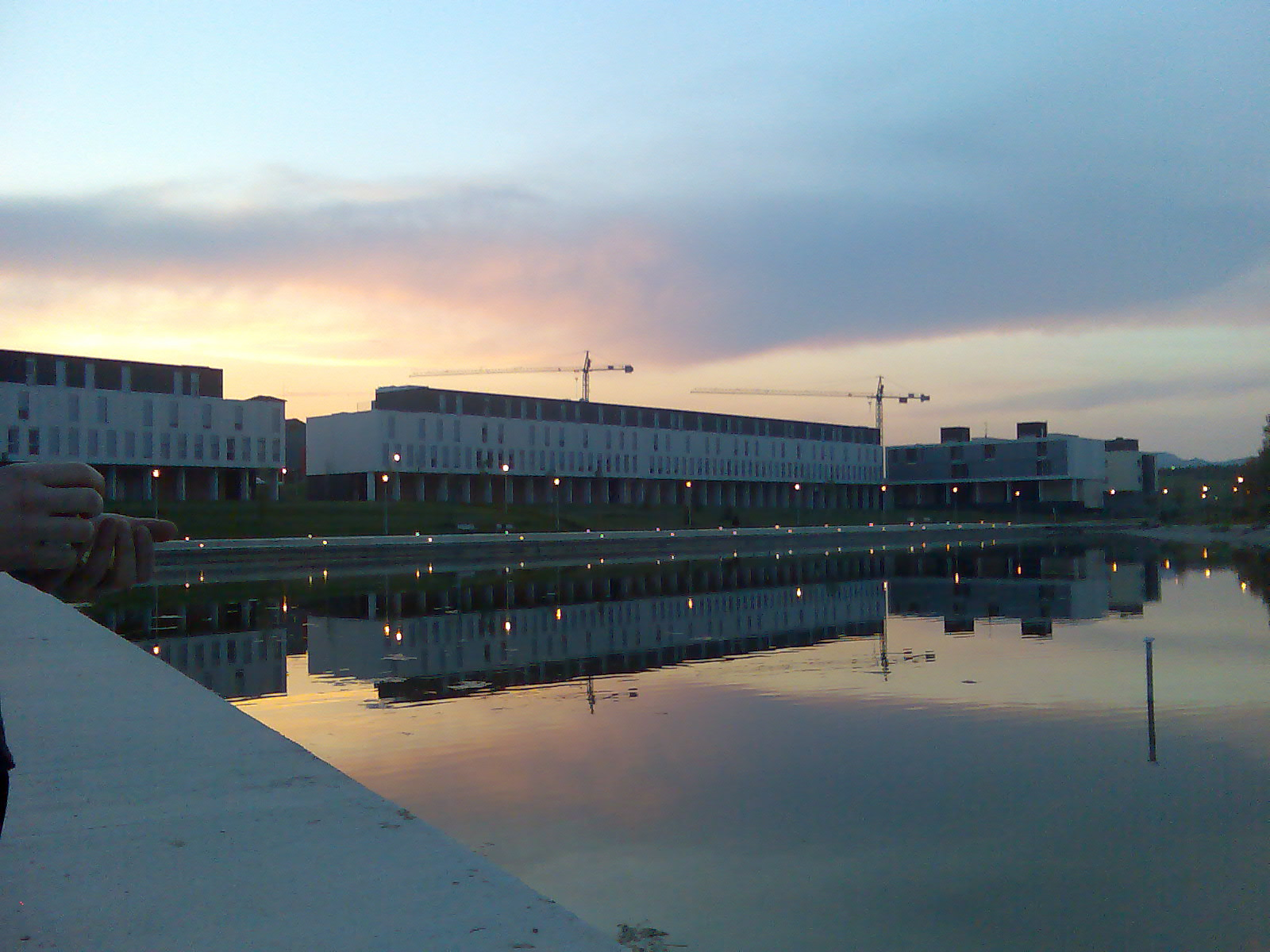 Foto del Lago de Sarriguren, en el Valle de Egüés, Navarra